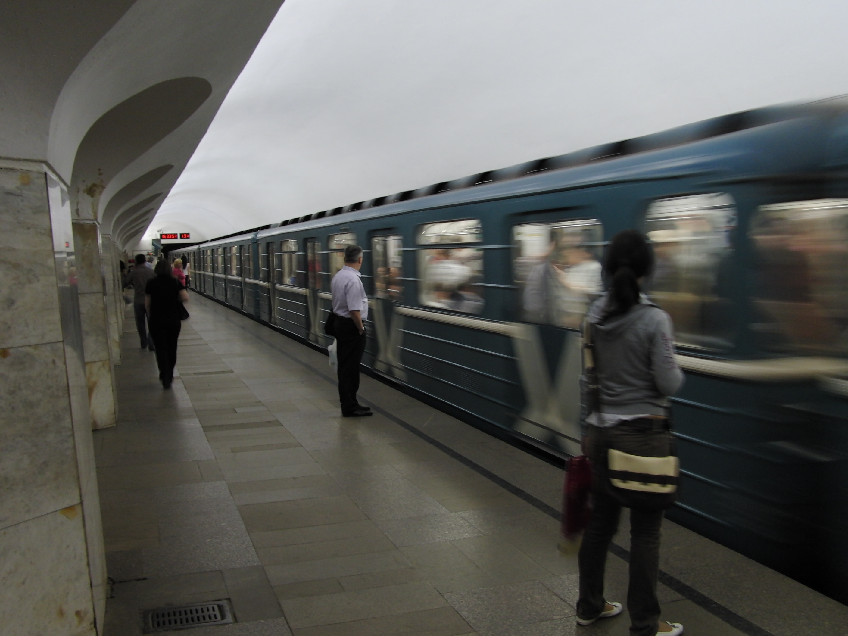 Borovitskaya (Боровицкая)